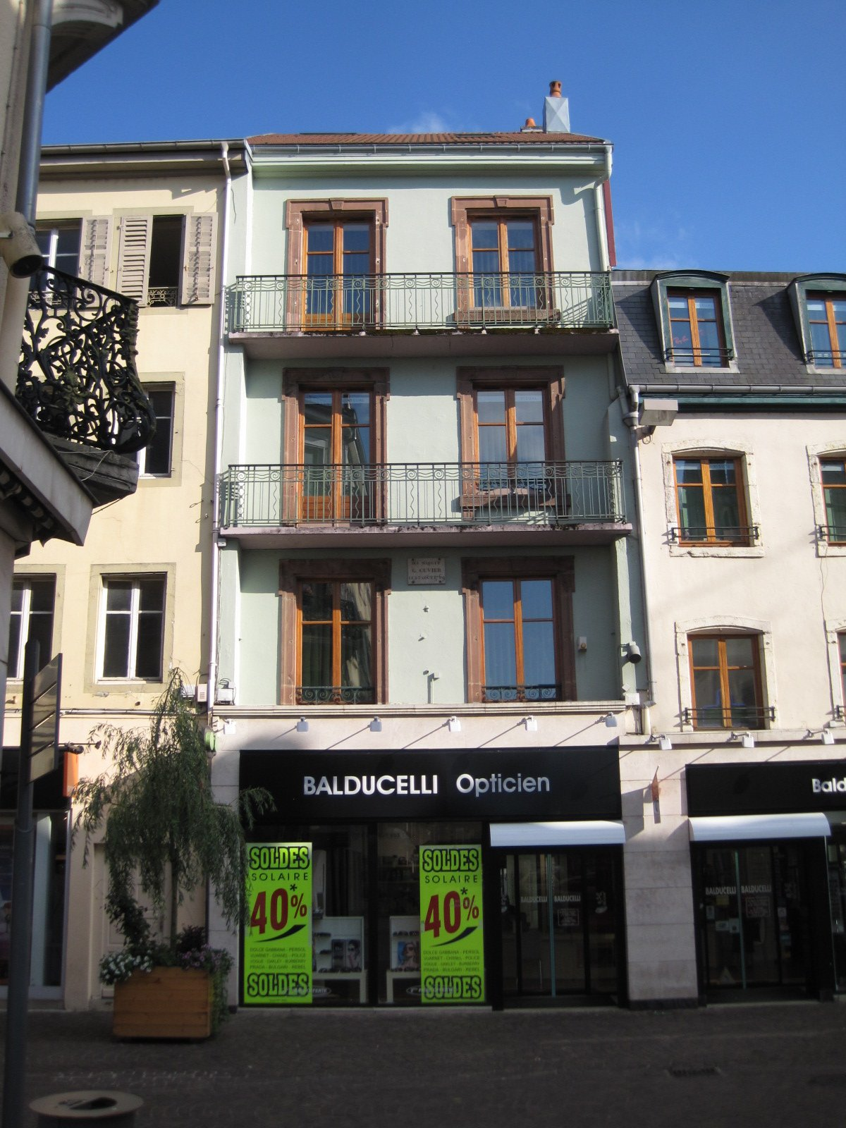 Maison de naissance de Georges Cuvier, rue Georges Cuvier, à Montbéliard en Franche-Comté